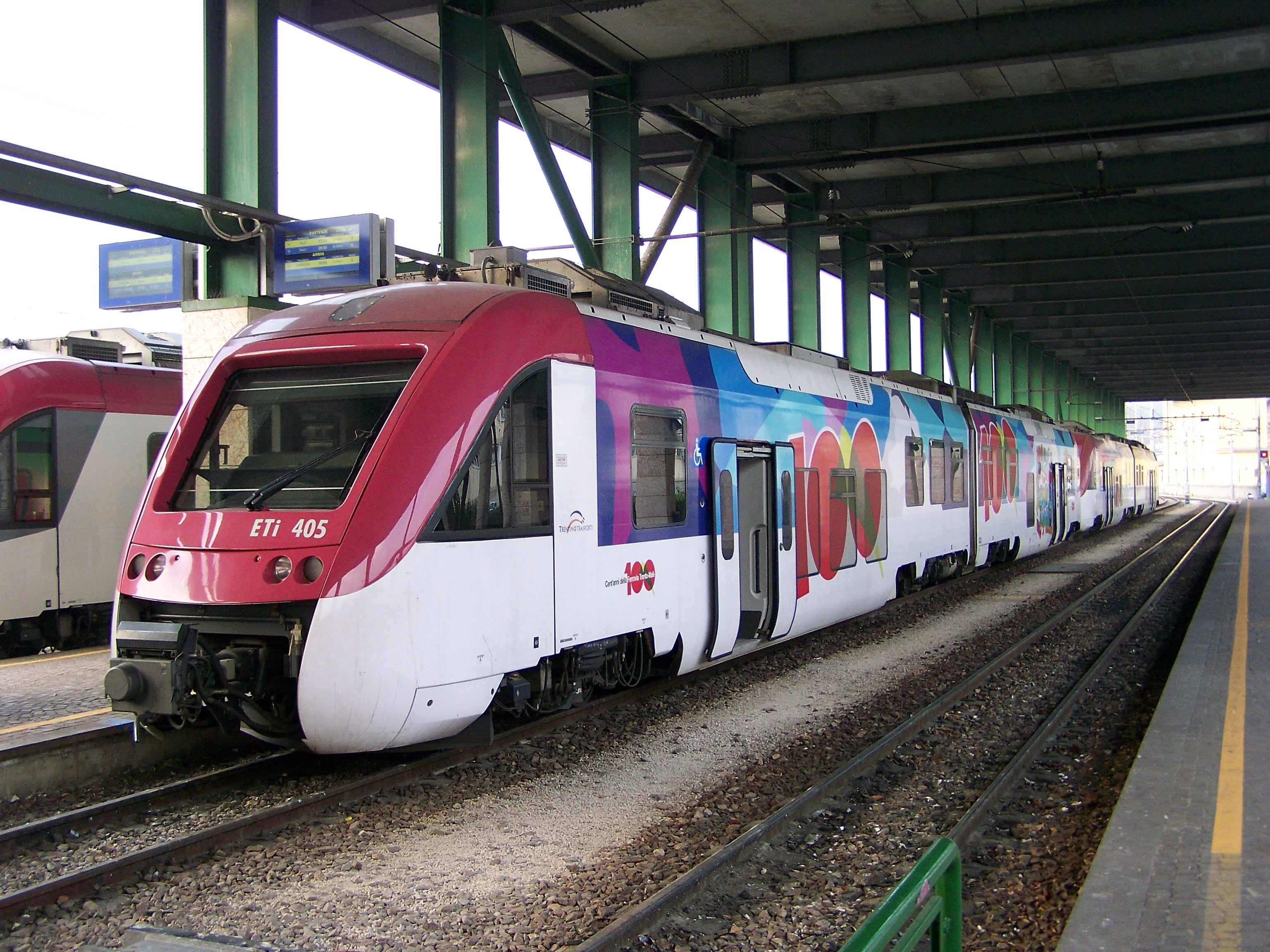 Convoglio di ETi serie 400 in sosta presso il secondo binario di Trento FTM.